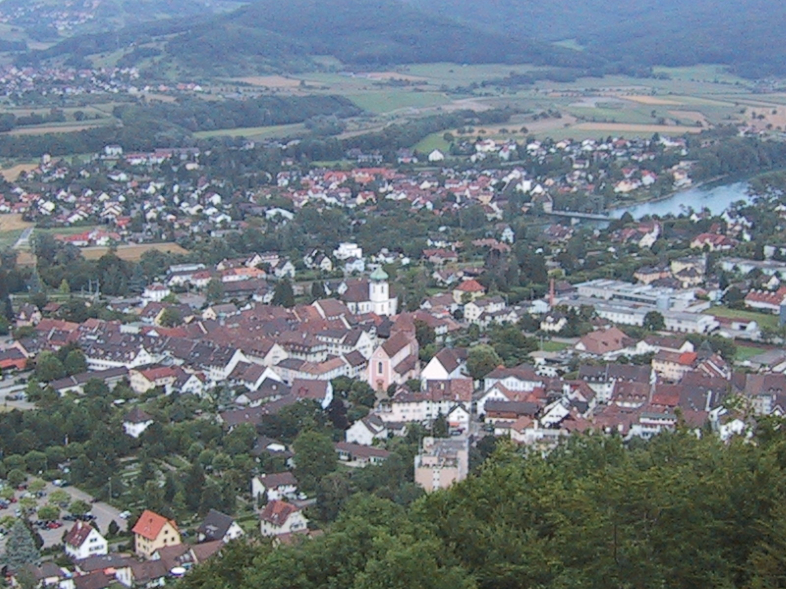 Zurzach aufgenommen vom südlich gelegenen Achenberg